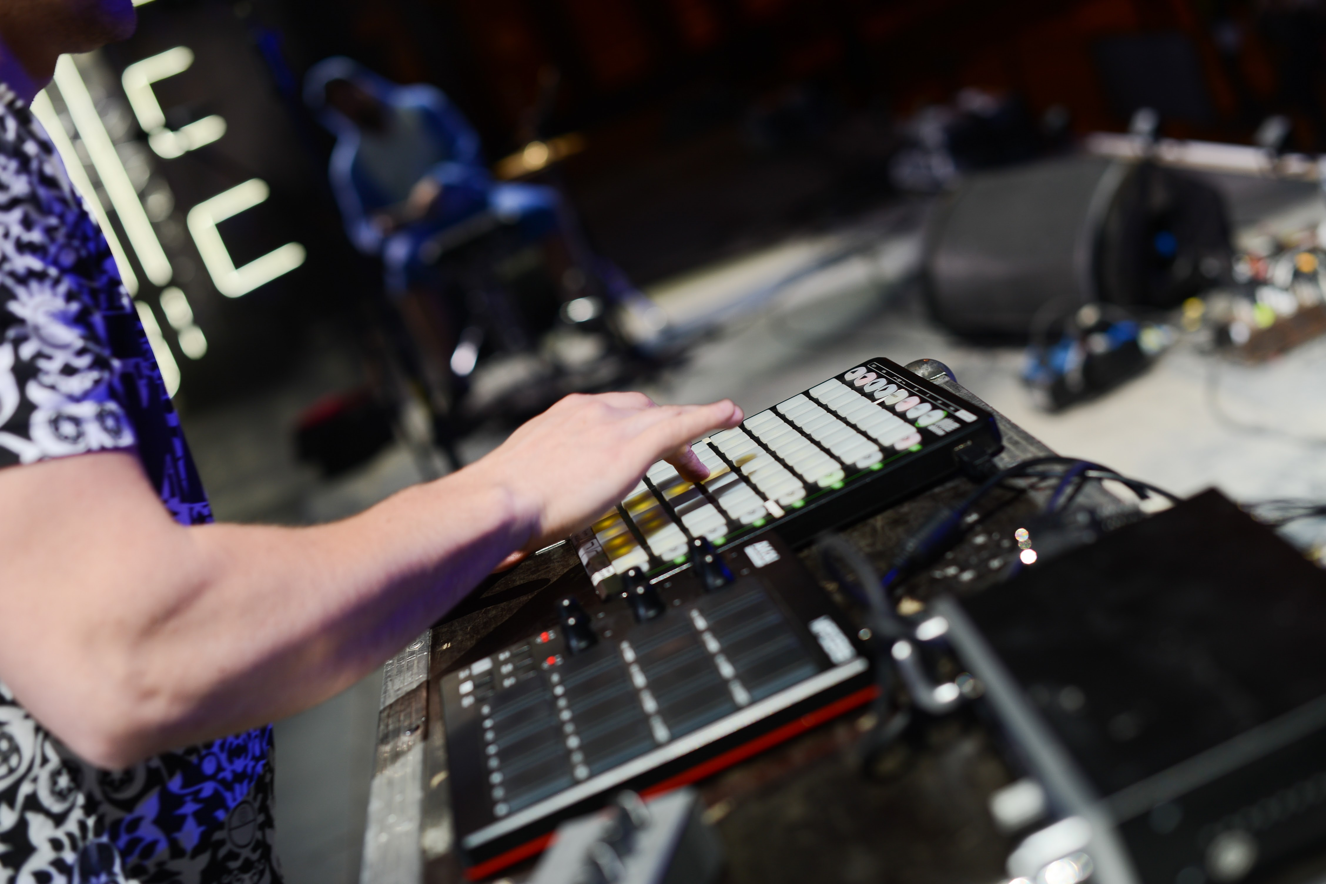 Роман Черенов виконує музичну композицію